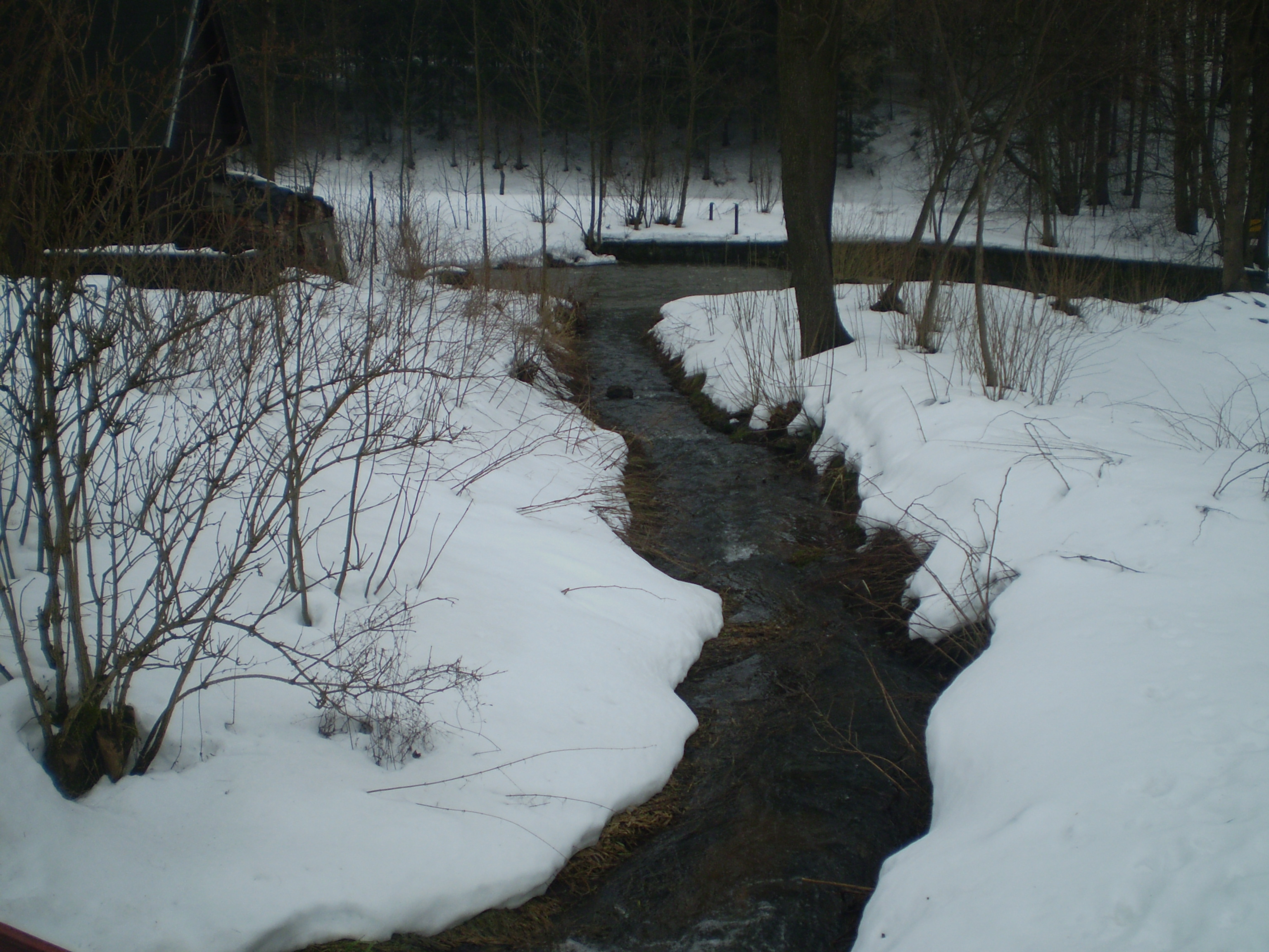 Mladkovský potok, Orlické hory